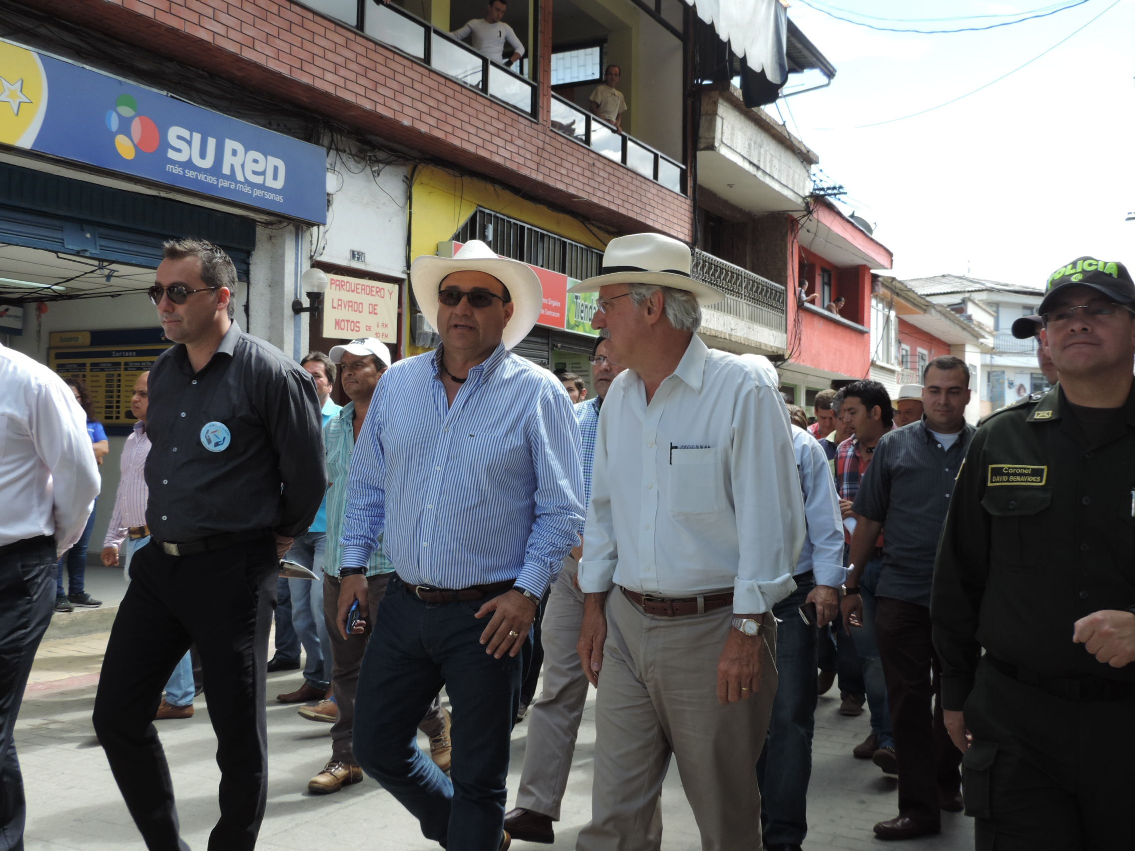 Julian Gutierrez Botero Gobernador